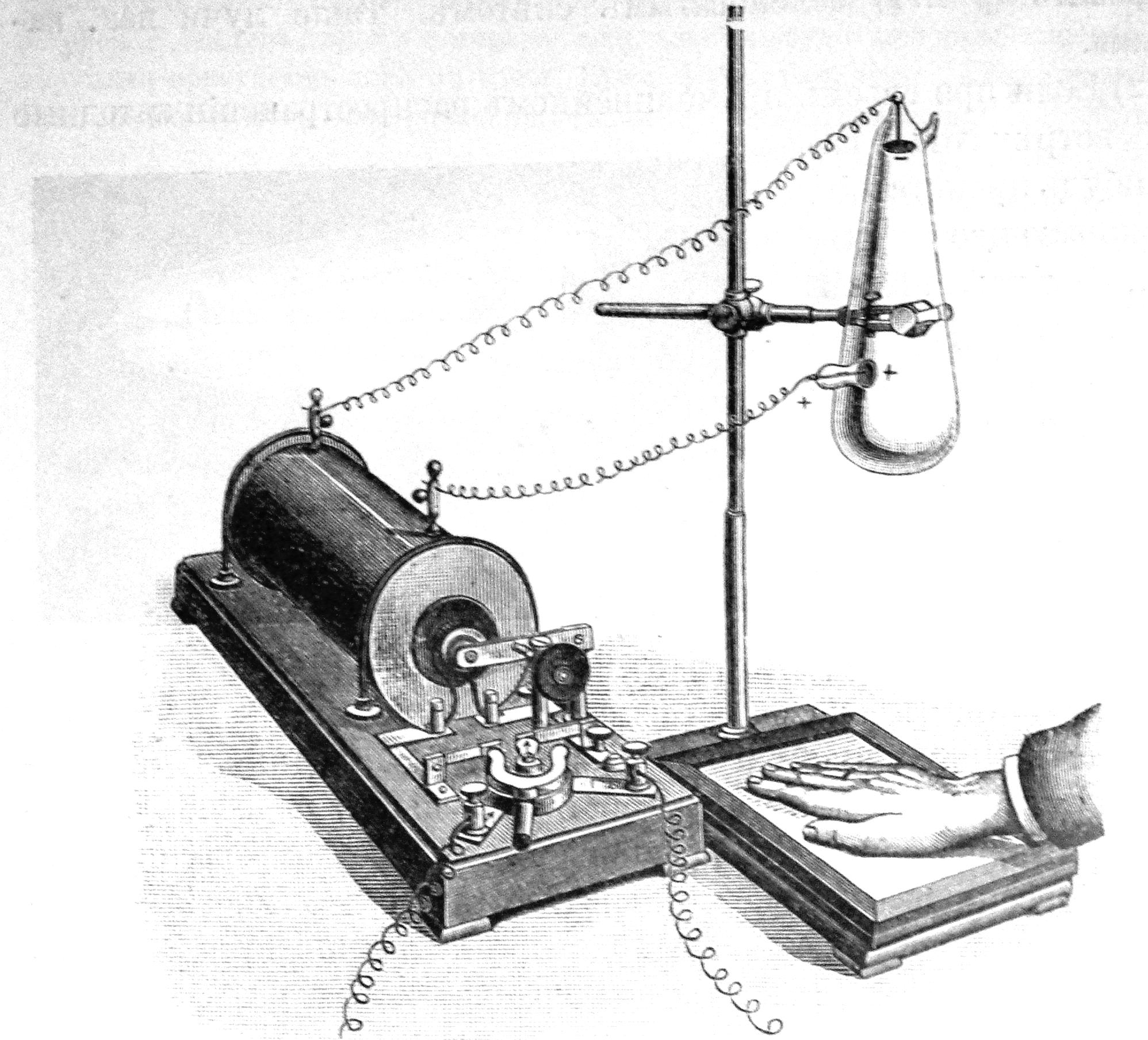 Сканированное изображение установки для экспериментов с Х-лучами. Трубка Крукса, катушка Румкорфа.